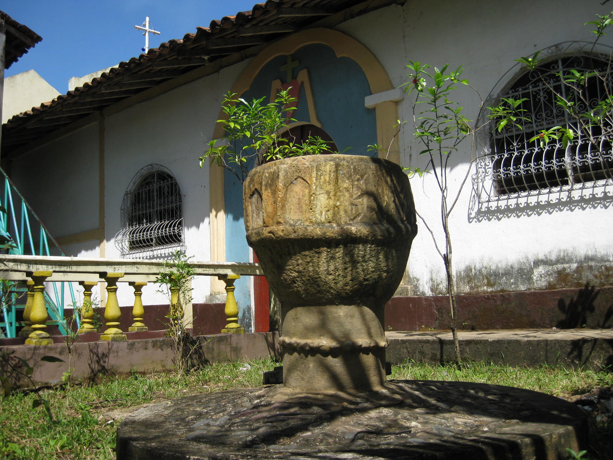 Pila bautismal usada anteriormente para seremonias de bautizo ubicada al lado derecho de la Parroquia San Caralampio.